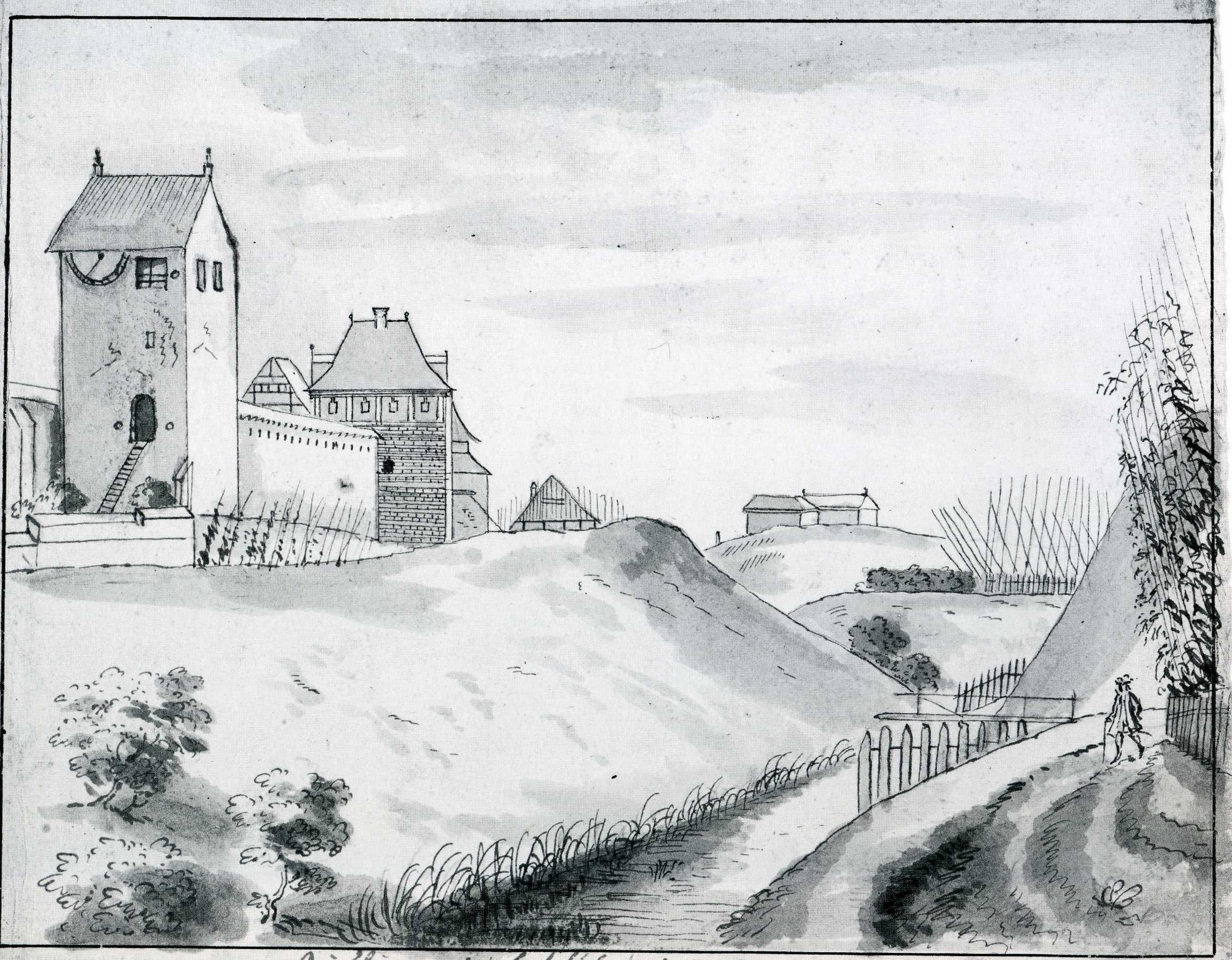 Die Partie beim Kalchtor um 1735, erbaut etwa 1240, abebrochen 1868